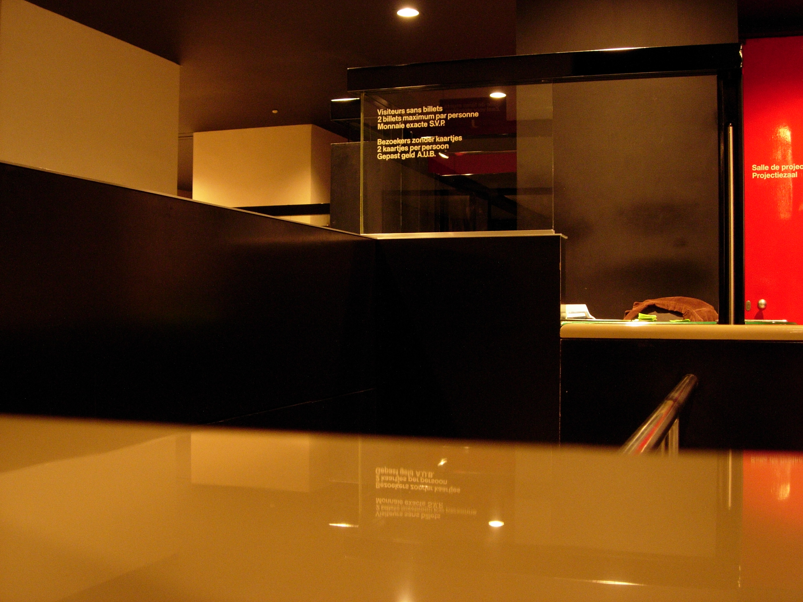 Entrée de la salle de projection du Musée du Cinéma (Cinémathèque Royale de Bruxelles.)